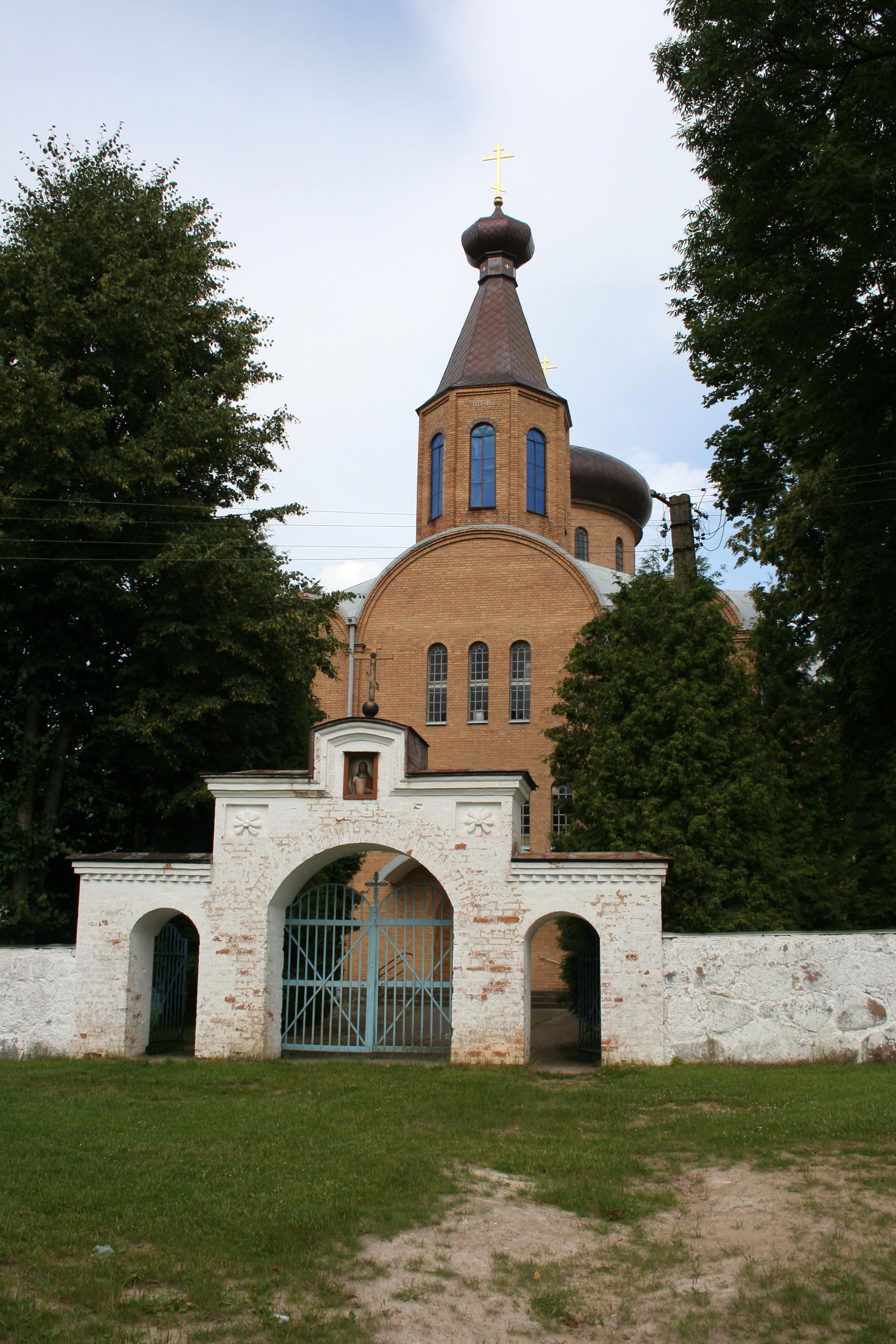 Cerkiew Wniebowstąpienia Pańskiego w Klejnikach.